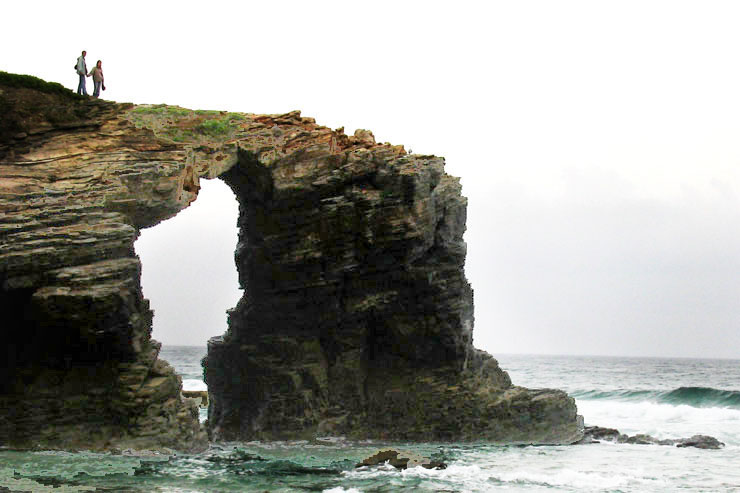 Praia das Catedrais - Ribadeo, Lugo, Galiza.'Praia das Catedrais - Lugo'